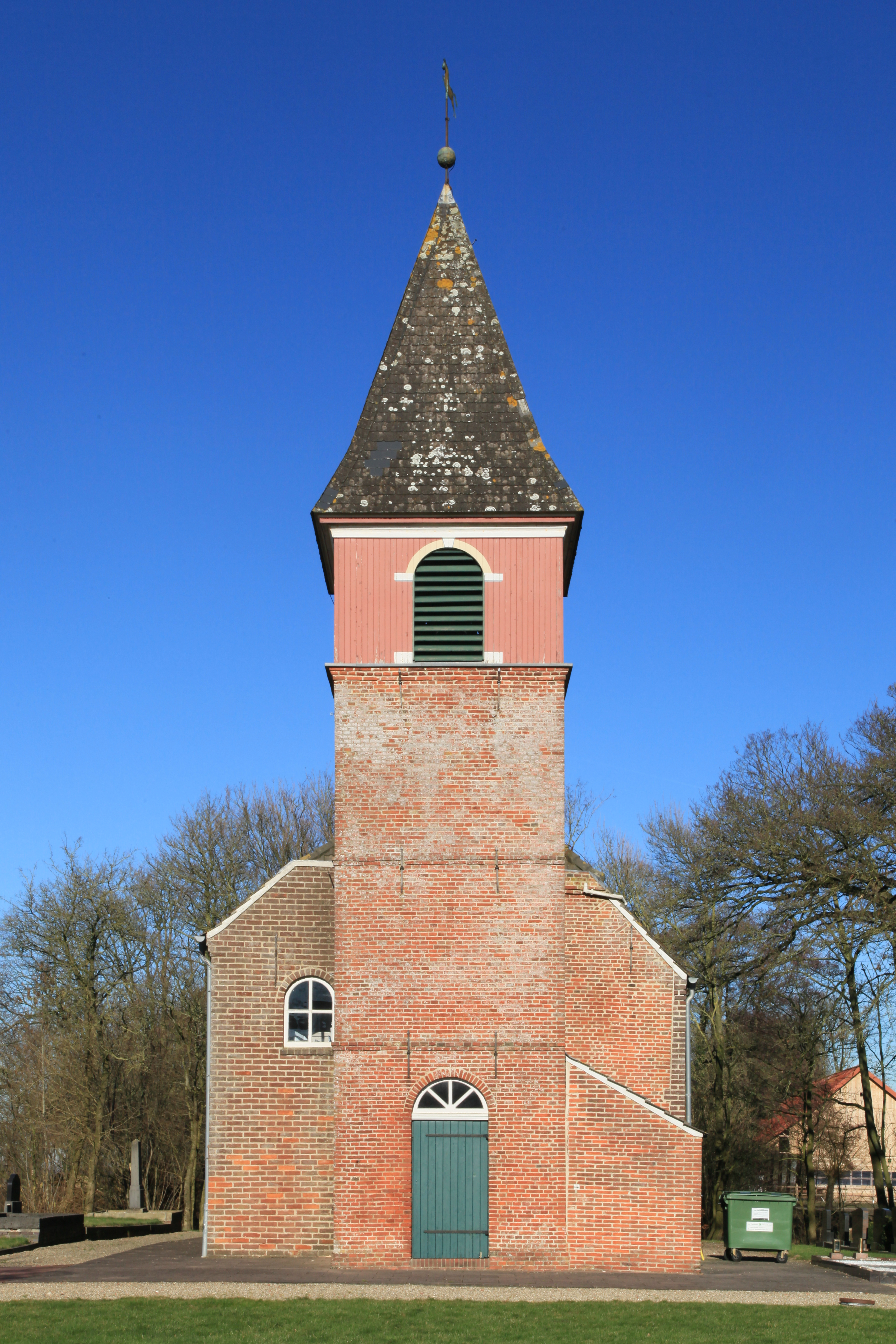 Landschaftspolder Kirche, Landschaftspolder in Bunde (Germany)